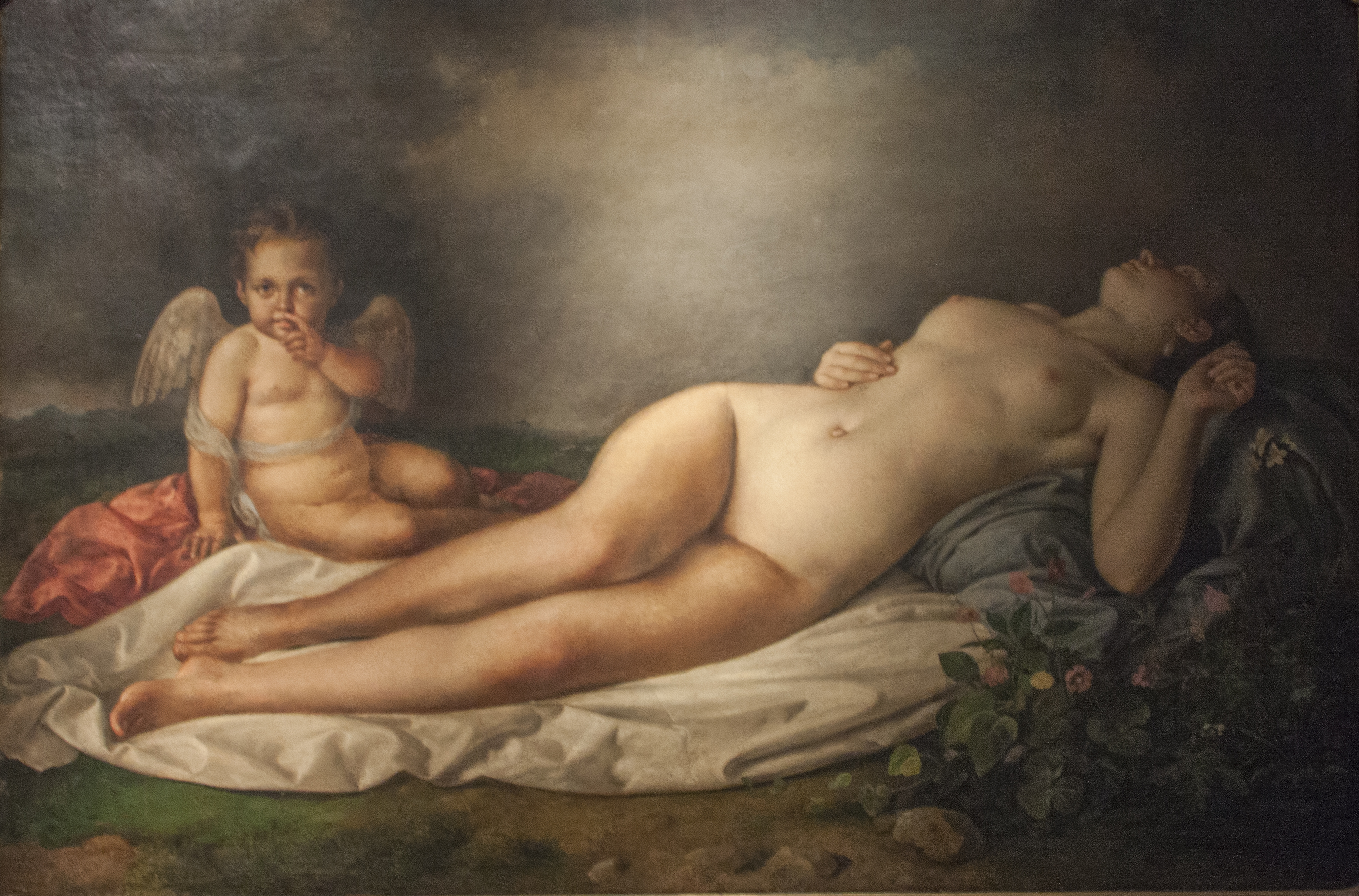 Venere dormiente - Andrea D'Antoni olio su tela 1840